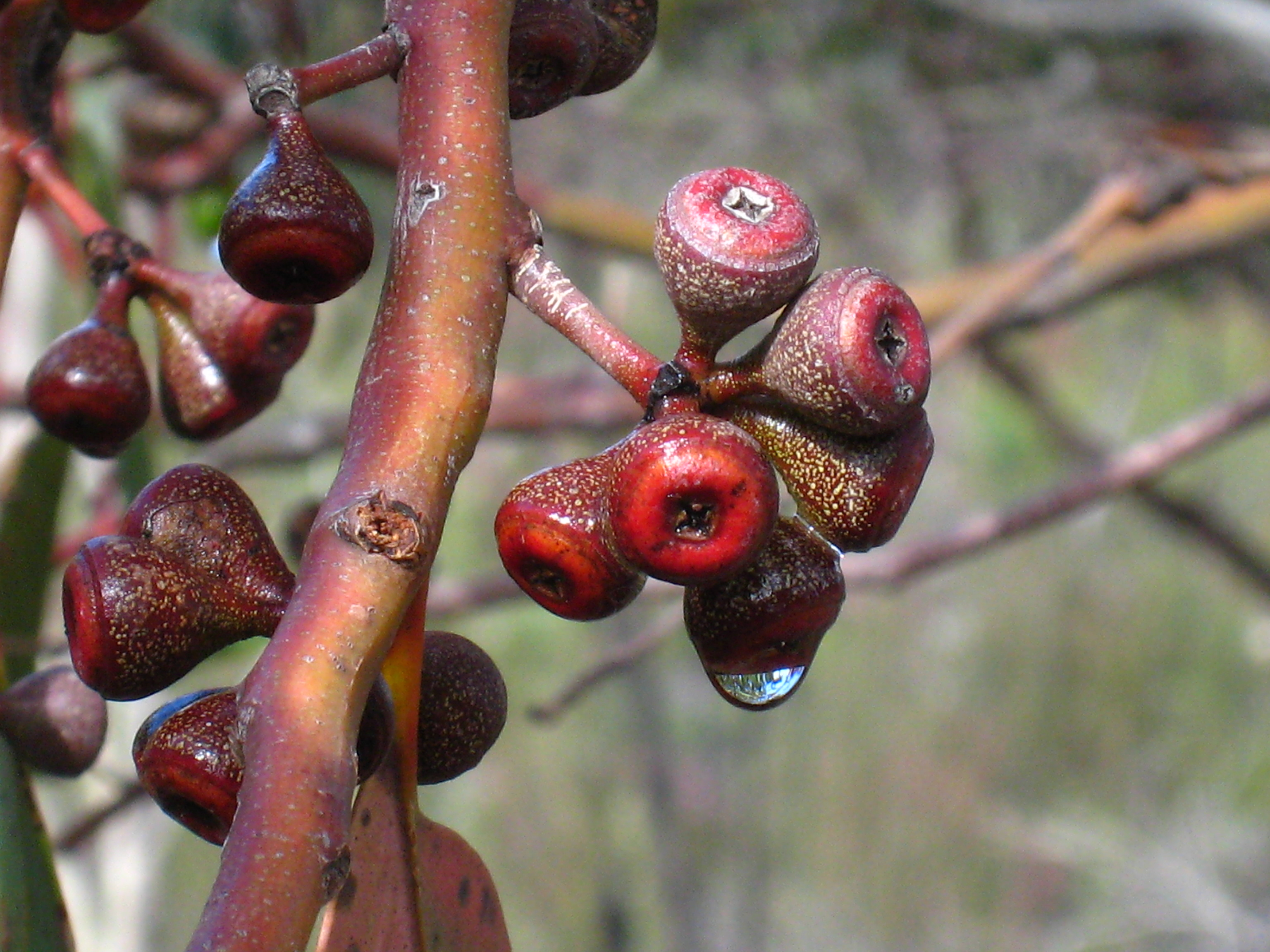 Gumnuts, Eucalyptus haemastoma, Ku-ring-gai Chase NP.